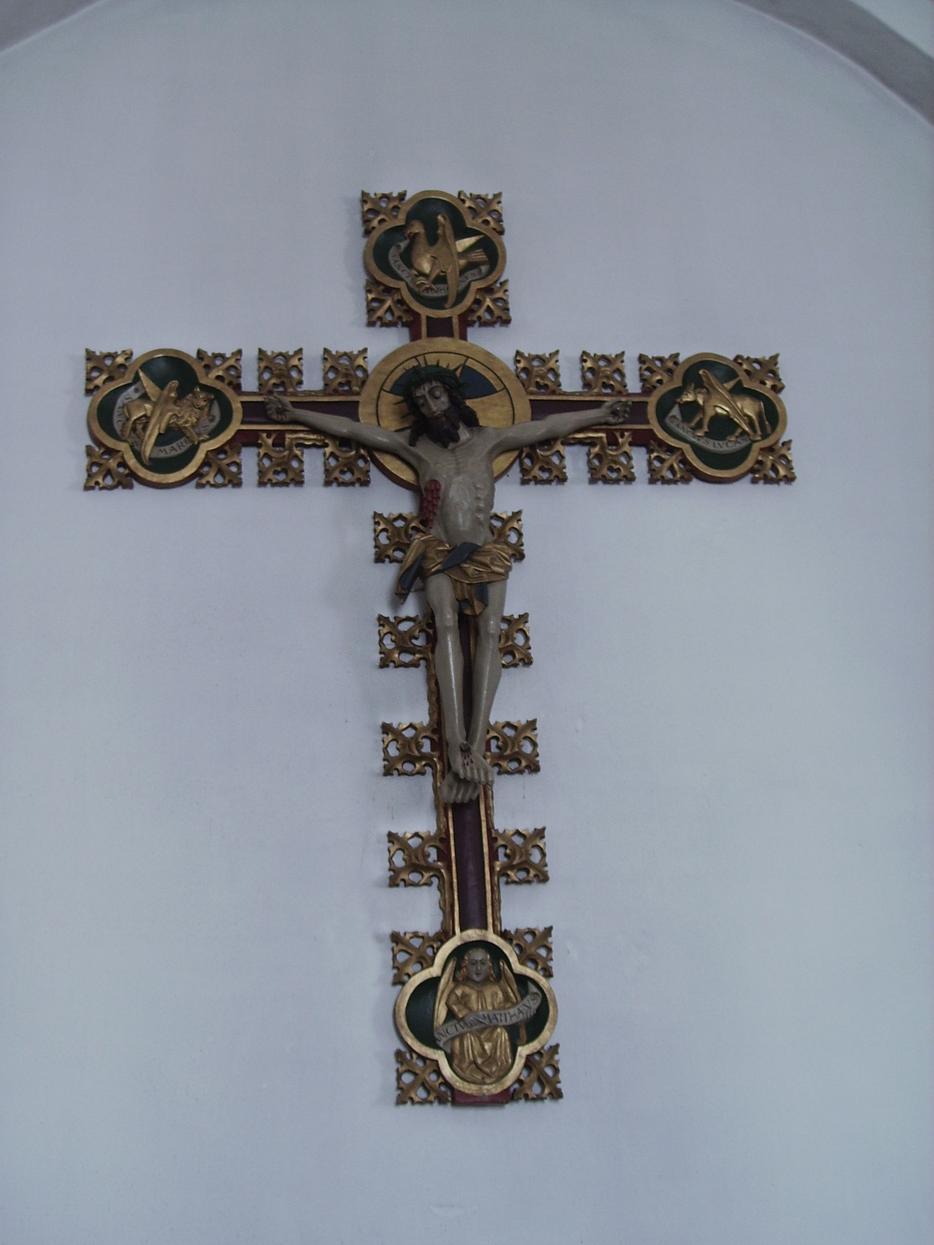 Kors i Krogsbølle Kirke, Krogsbølle Sogn, Skam Herred, Odense Amt, Denmark (Danish Church)